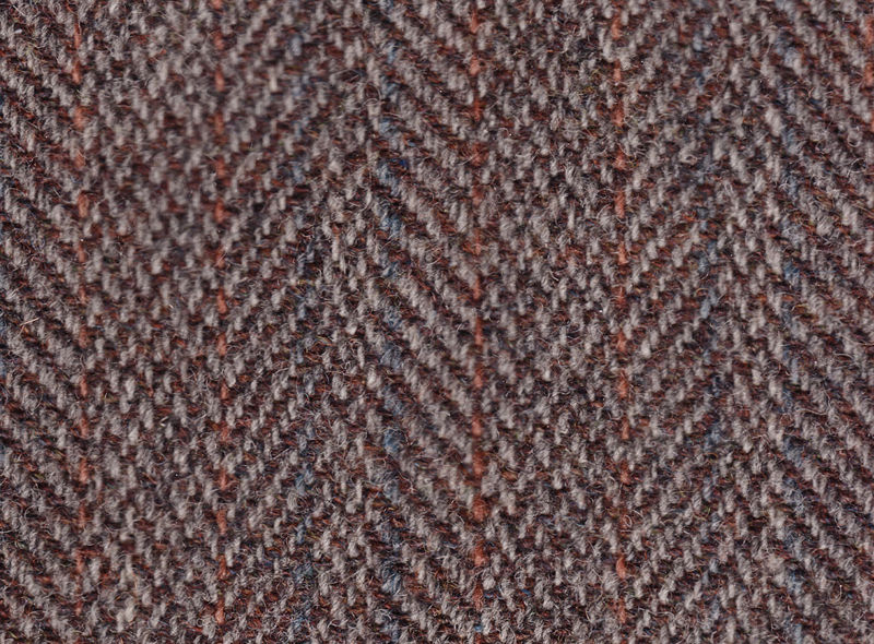 Tkanina z mykane vlny (tvid)